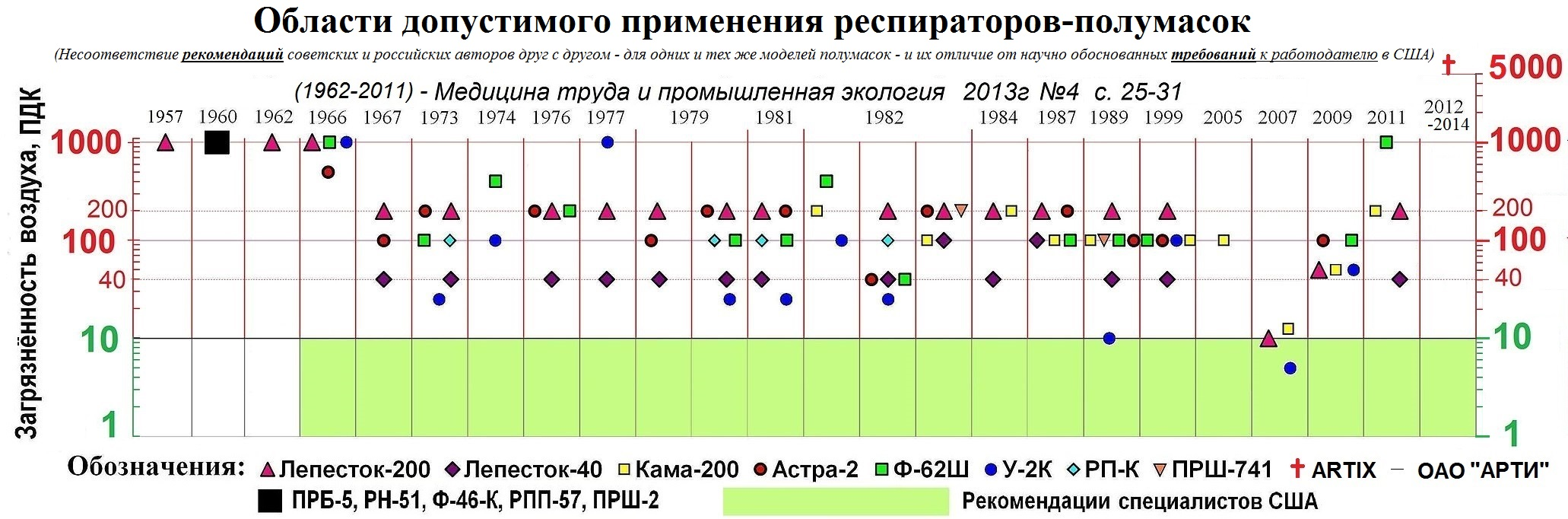 Показаны рекомендации советских и российских авторов, относящиеся к области допустимого применения респираторов-полумасок разных моделей, их не соответствие друг другу, и не соответствие научно обоснованным требованиям стандартов по охране труда и рекомендациям специалистов в США